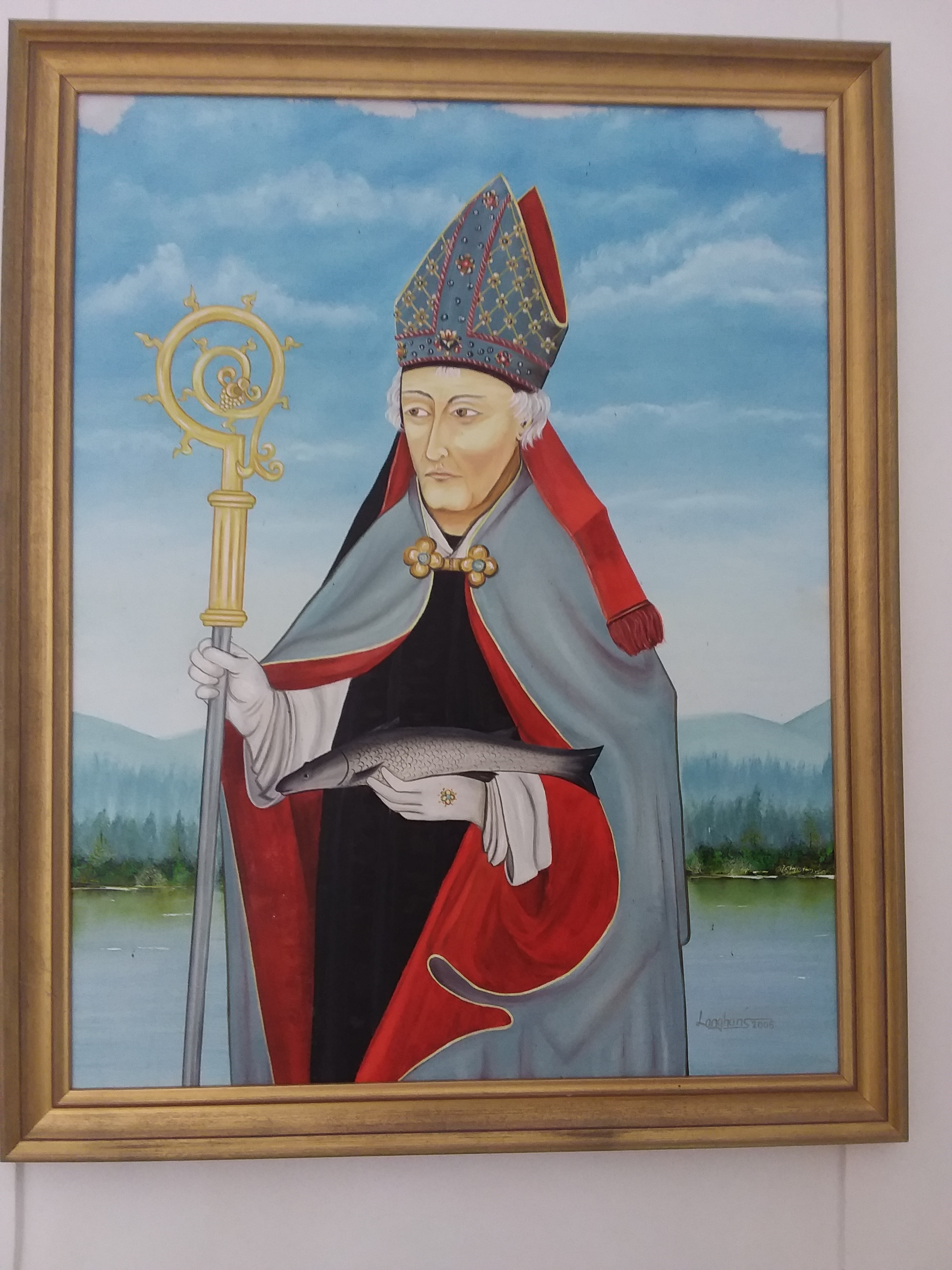 Kapelle St. Ulrich bei der Labermühle, Ortsteil von Deining im Landkreis Neumarkt in der Oberpfalz, Bayern, Kapellenpatron St. Ulrich